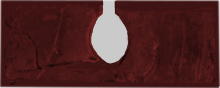 Rekonstruktion des 2014 in Vindolanda/Chesterholm ausgegrabenen Toilettensitzes (2. Jahrhundert n.Chr.).